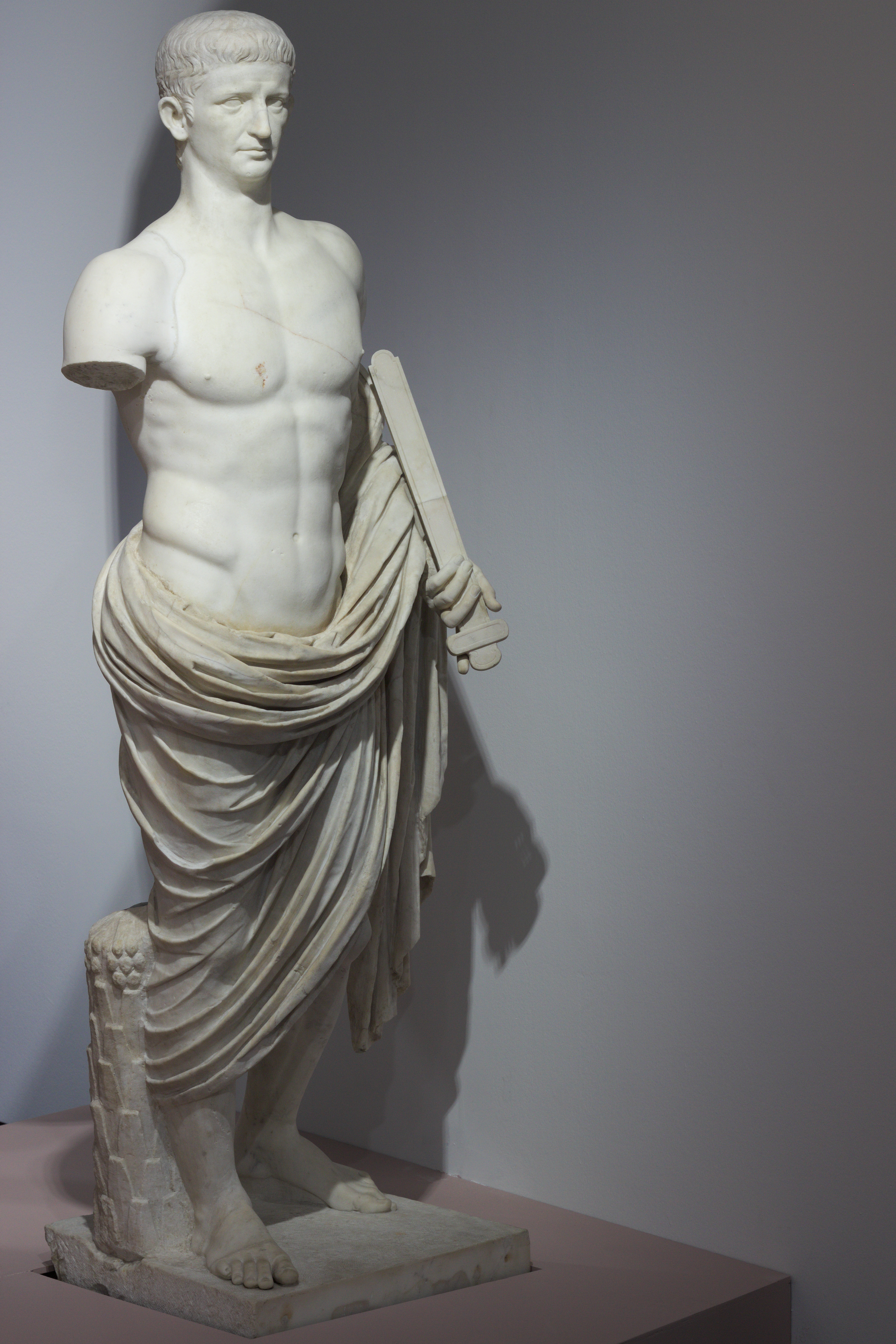 Claude, découvert à Gabies (Latium) en 1792, marbre.